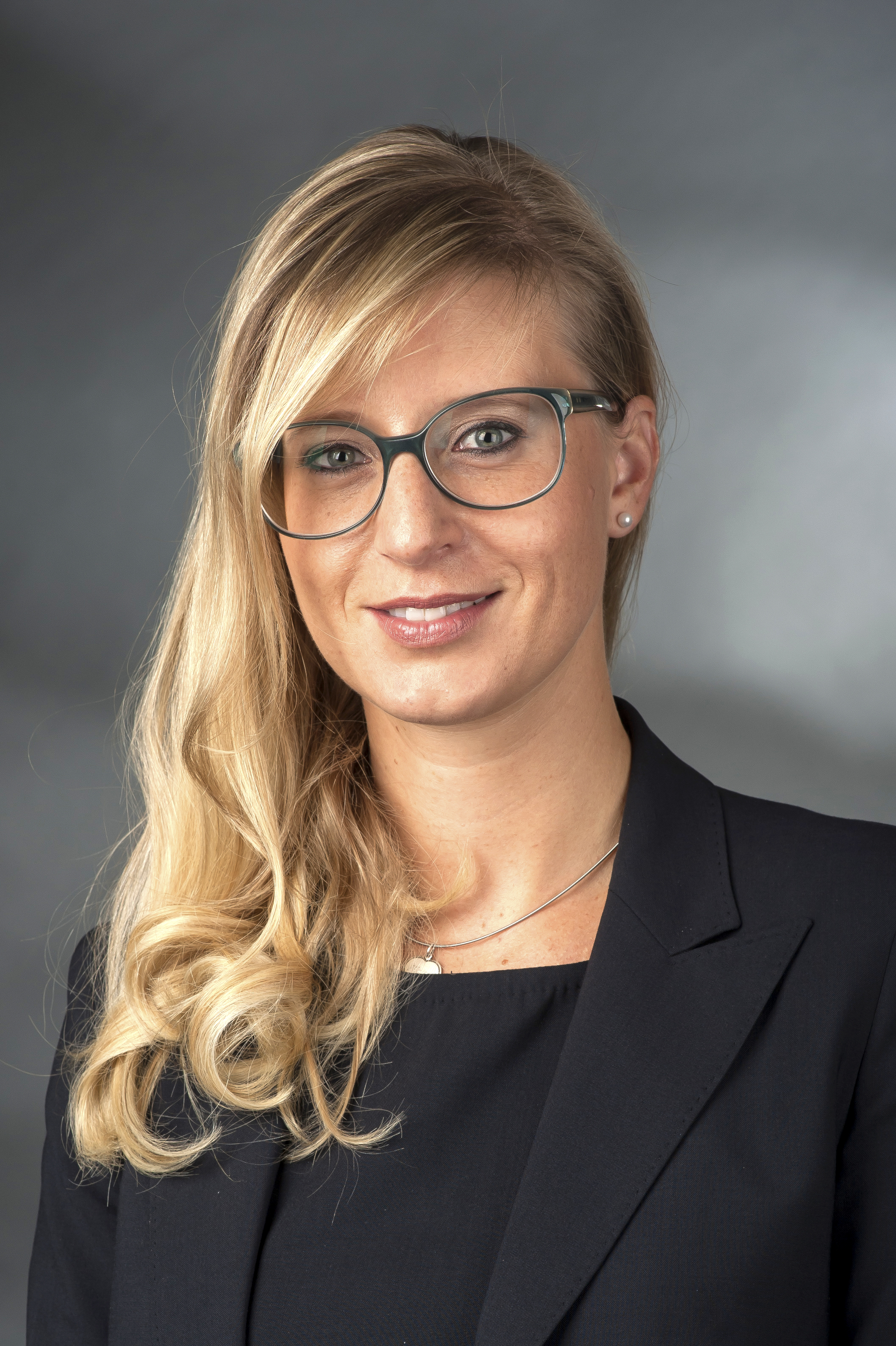 Katrin Albsteiger (* 20. November 1983 in Elchingen als Katrin Poleschner) ist eine deutsche Politikerin der CSU. Sie ist die stellvertretende Bundesvorsitzende der Jungen Union. Sie ist Mitglied des Deutschen Bundestages seit der 18. Wahlperiode.